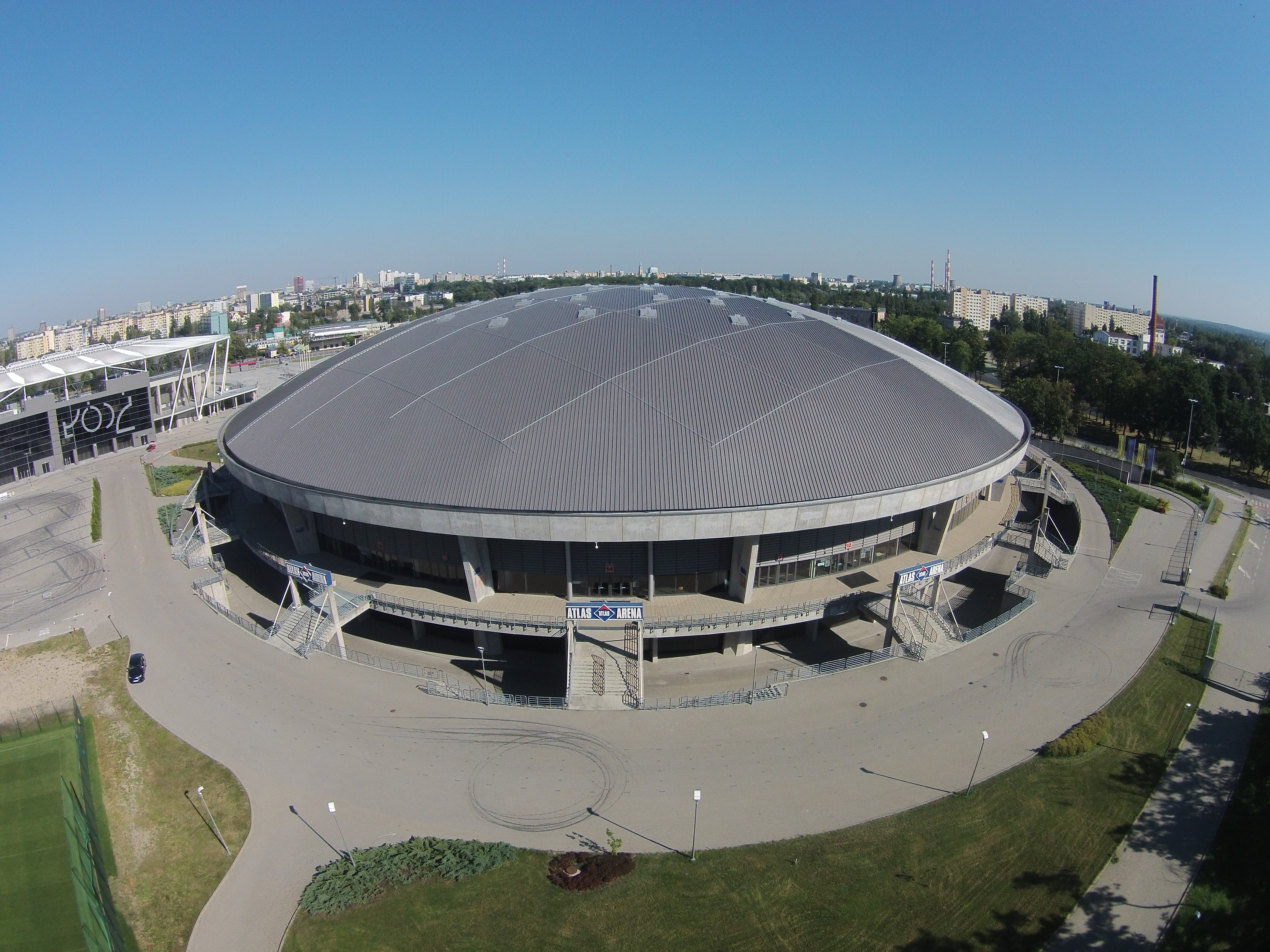 Atlas Arena - Łódź